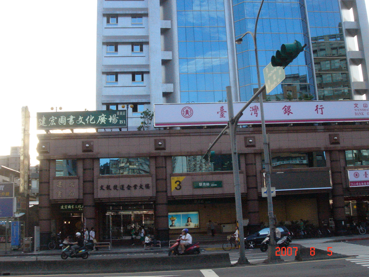 台北捷運景美站3號出口與臺灣銀行文山分行同樣位於台北市文山區羅斯福路六段「文凱捷運企業大樓」內。